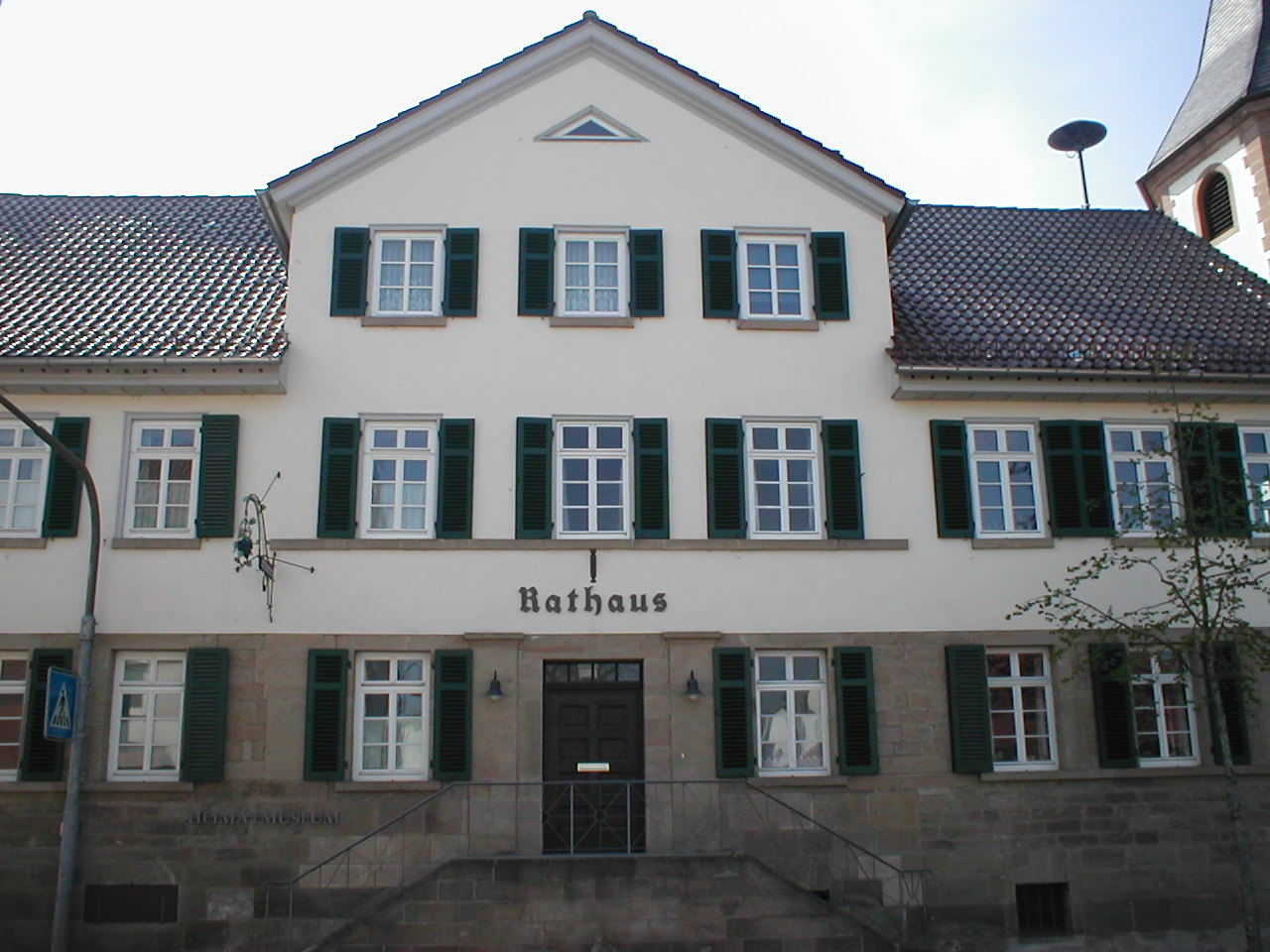 Rathaus in Botenheim, erbaut 1837 als Rat- und Schulhaus